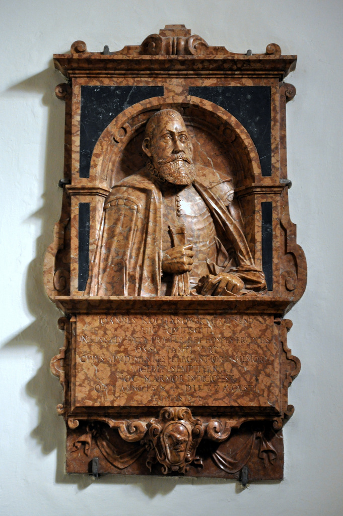 Kościół p.w. Podwyższenia Krzyża Świętego w Zwoleniu z XVI w. - kaplica p.w św. Franciszka, nazywana też kaplicą Kochanowskich - epitafium Jana Kochanowskiego wykonane ok. 1610 roku w czerwonym marmurze chęcińskim. Popiersie jest jedynym bliskim autentyczności wizerunkiem poety.